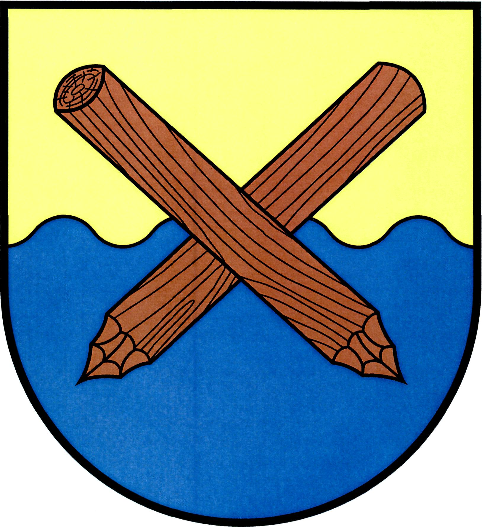 Znak obce Starý Kolín